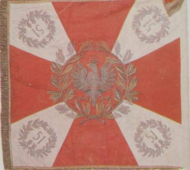 Sztandar 51 Pułku Piechoty Strzelców Kresowych im. Giuseppe Garibaldiego (strona prawa)